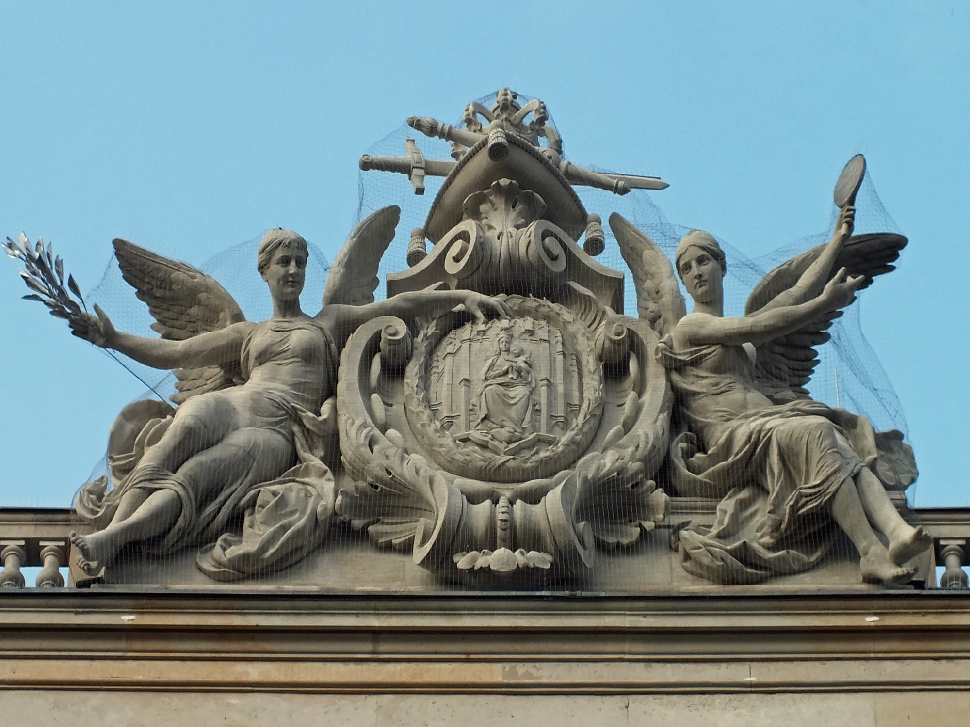 Attika-Gruppe auf der Universitätsbibliothek Leipzig von Joseph Kaffsack, Abguss von 2009 durch Markus Gläser